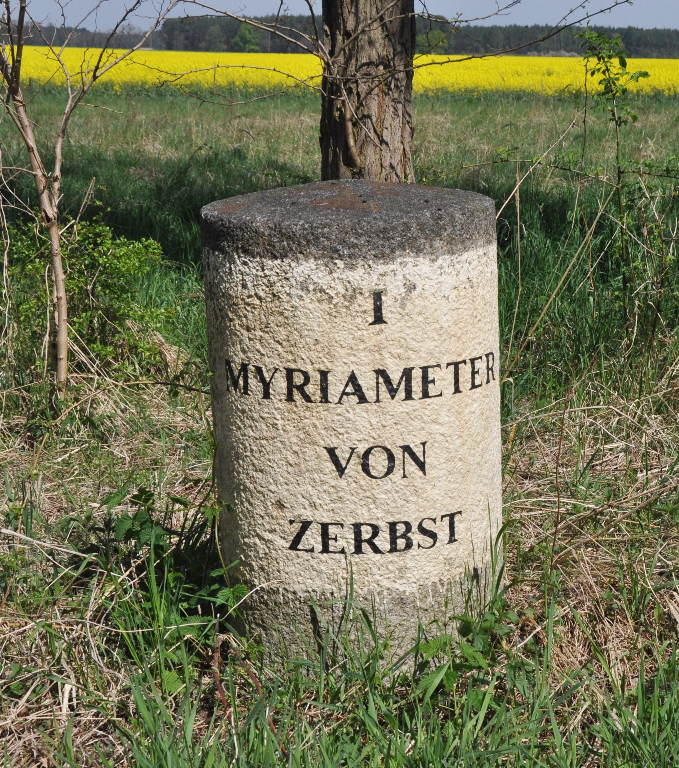 Myriameterstein hinter dem Ortsausgang Tochheim (Elbe) in Richtung Zerbst auf der linken Seite. Er besitzt das gleiche Aussehen wie der Myriameterstein am Ortsausgang von Steutz. Im Ort befinden sich weitere Distanzsteine.